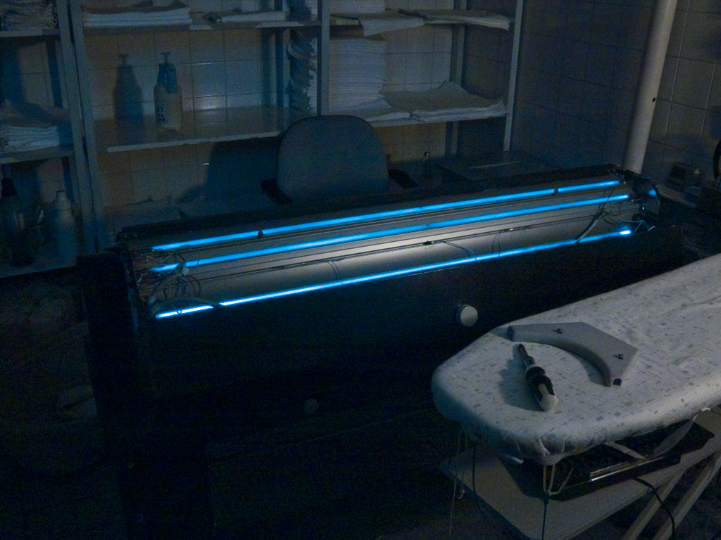 Fűtőtestek izzása a közeli infravörös tartományban; a képen jól megfigyelhető, hogy a legalsó a két végén túlhevül. Szabad szemmel csak ezeken a részeken figyelhető meg izzás, mely annyira halvány, hogy csak sötétben látható (helyszín: Ristorante Belvedere, Unterhaching, Németország)